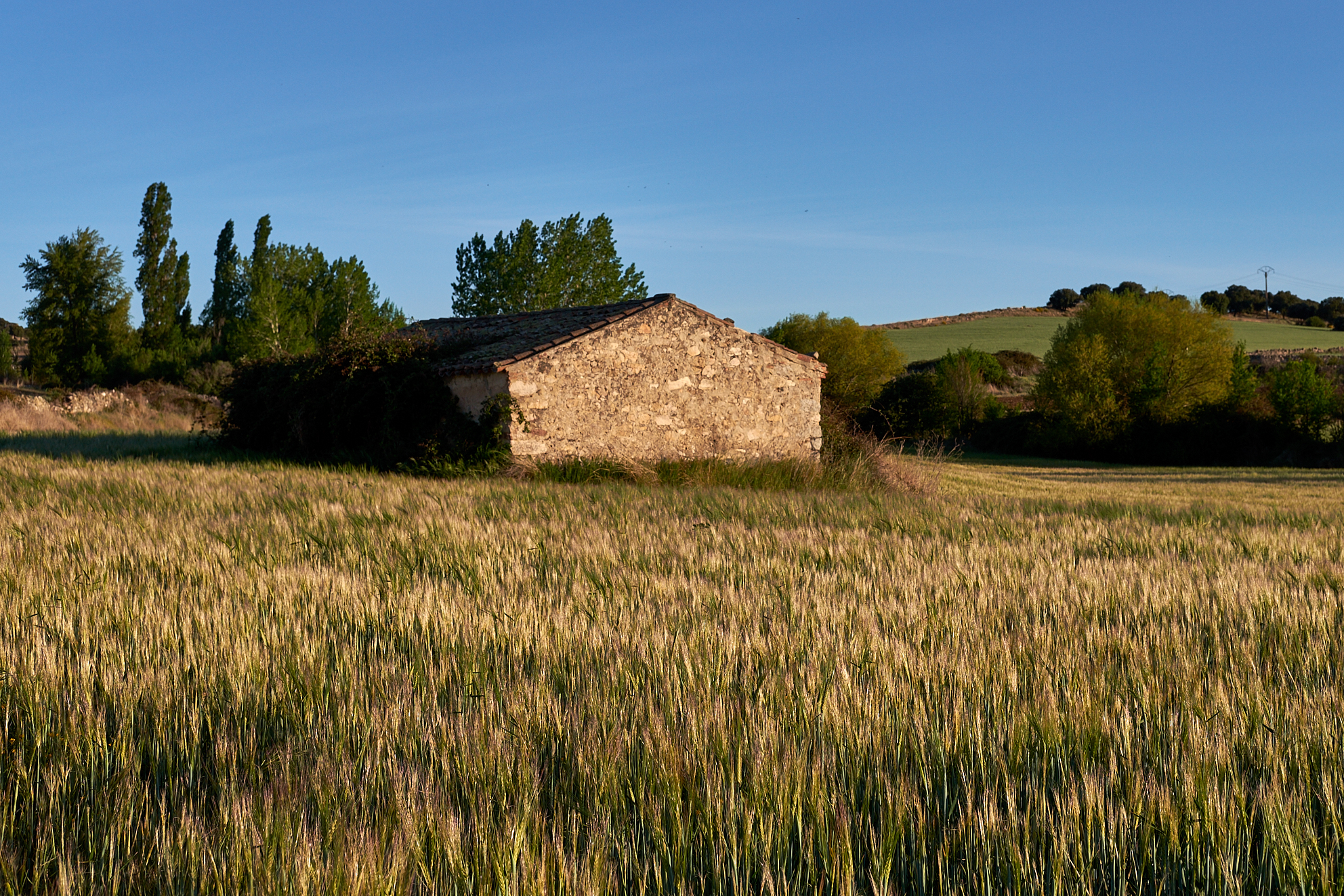 Casa y campo. Mingorría.